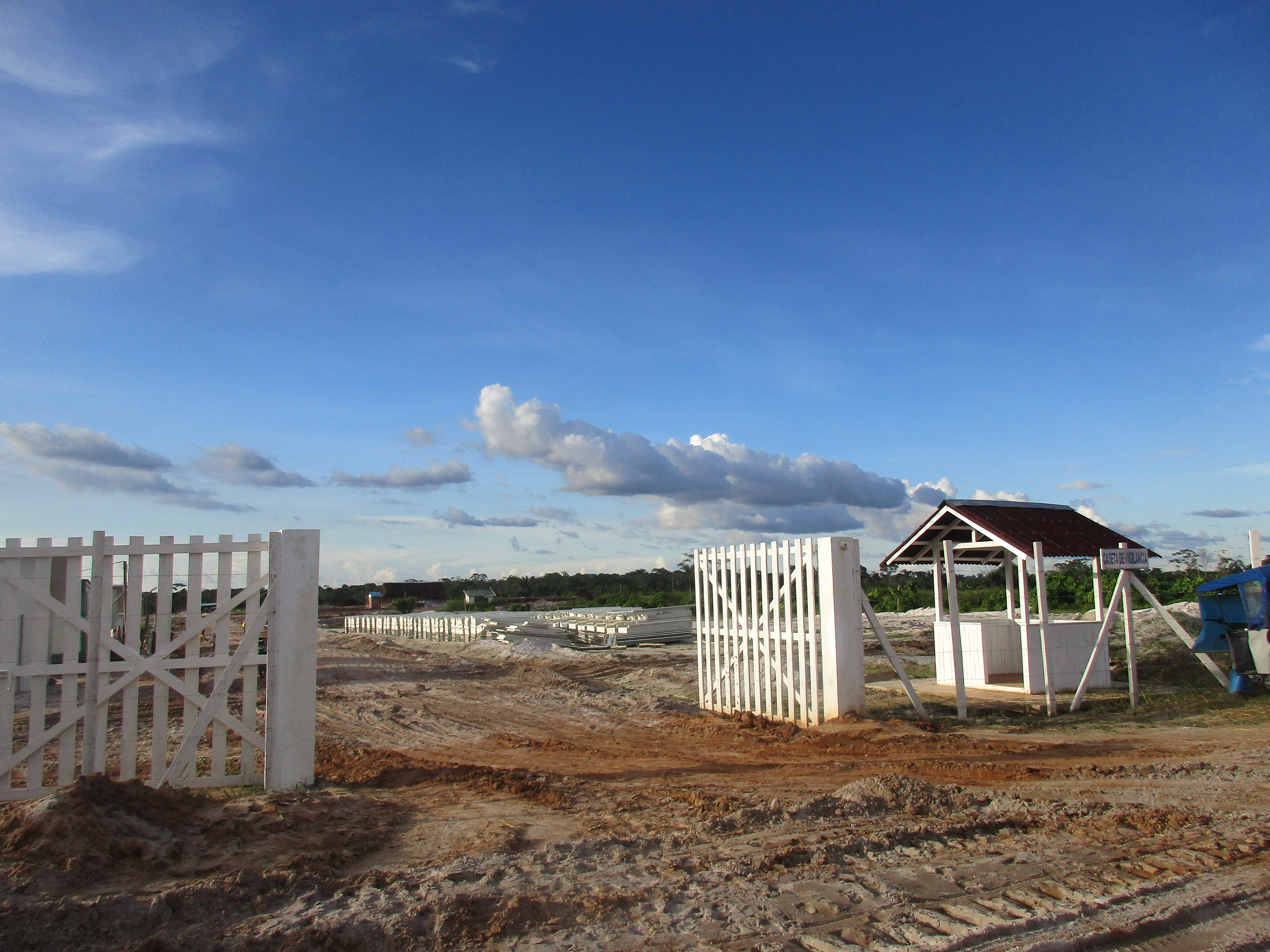 Entrada de la zona residencial de la Nueva ciudad de Belén